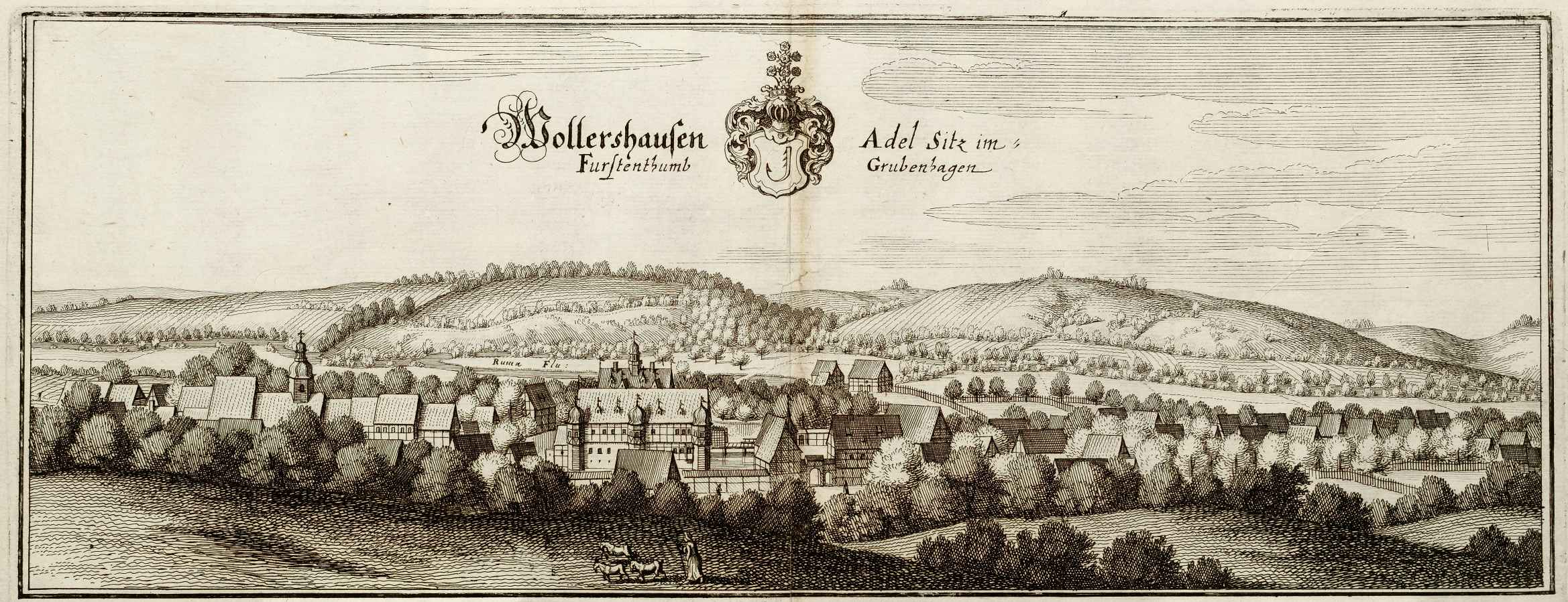 Wollershausen Adel Sitz im Furstenthumb Grubenhagen. Digitale Fotografie eines im Privatbesitz befindlichen Kupferstich-Druckes von Merian aus dem Jahre 1654. Aus "Topographia und Eigentliche Beschreibung Der Vornembsten Stäte, Schlösser auch anderer Plätze und Örter in denen Hertzogthümer[n] Braunschweig und Lüneburg, und denen dazu gehörende Grafschafften"